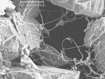 biométéorisation d'un basalte islandais par des actinomycètes